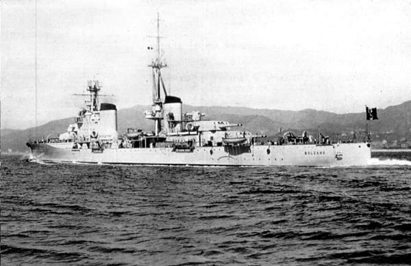 Італійський важкий крейсер «Больцано»